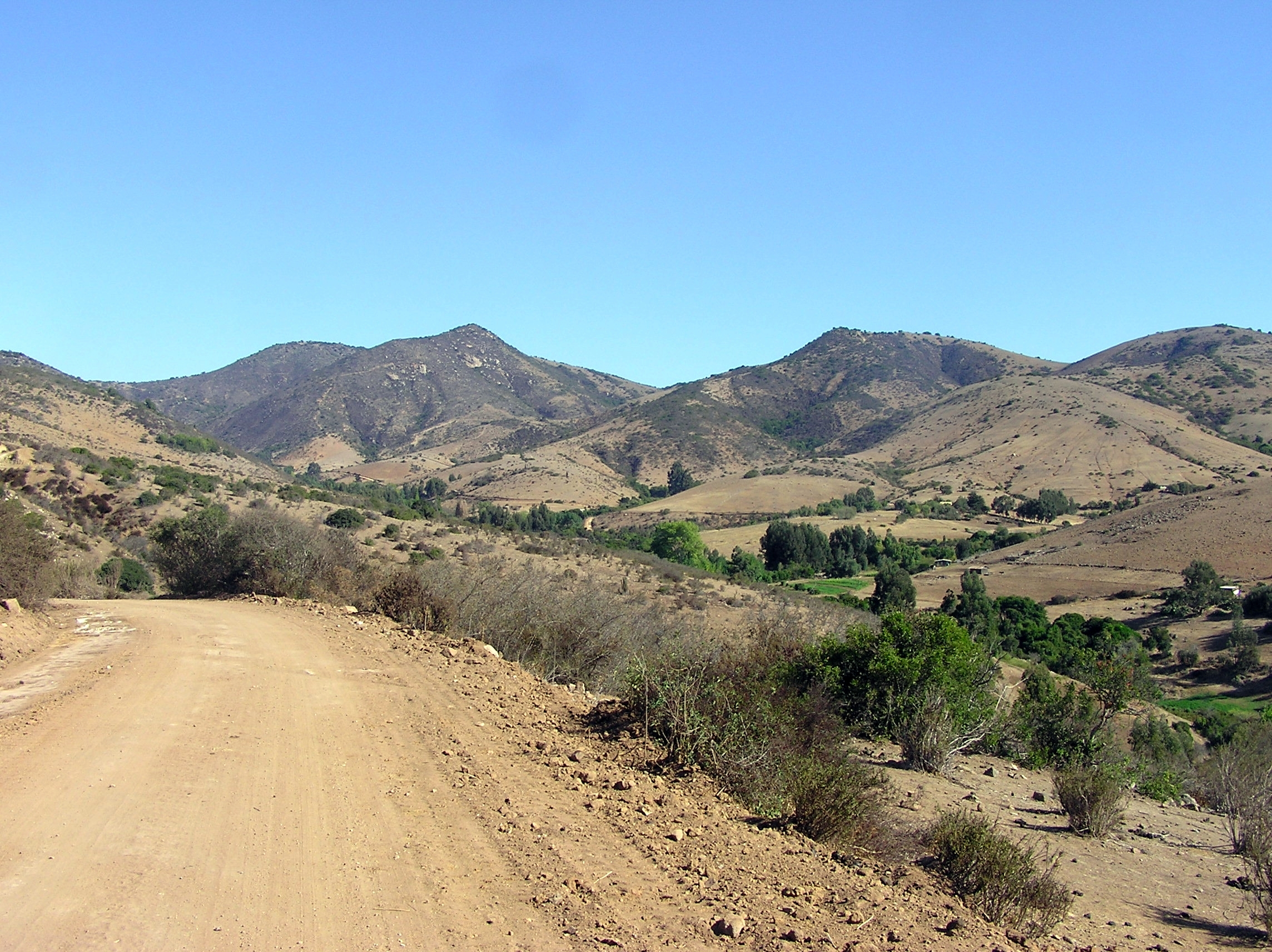 cerros de Guanguali, al interior de quilimari, Iv Region, Chile